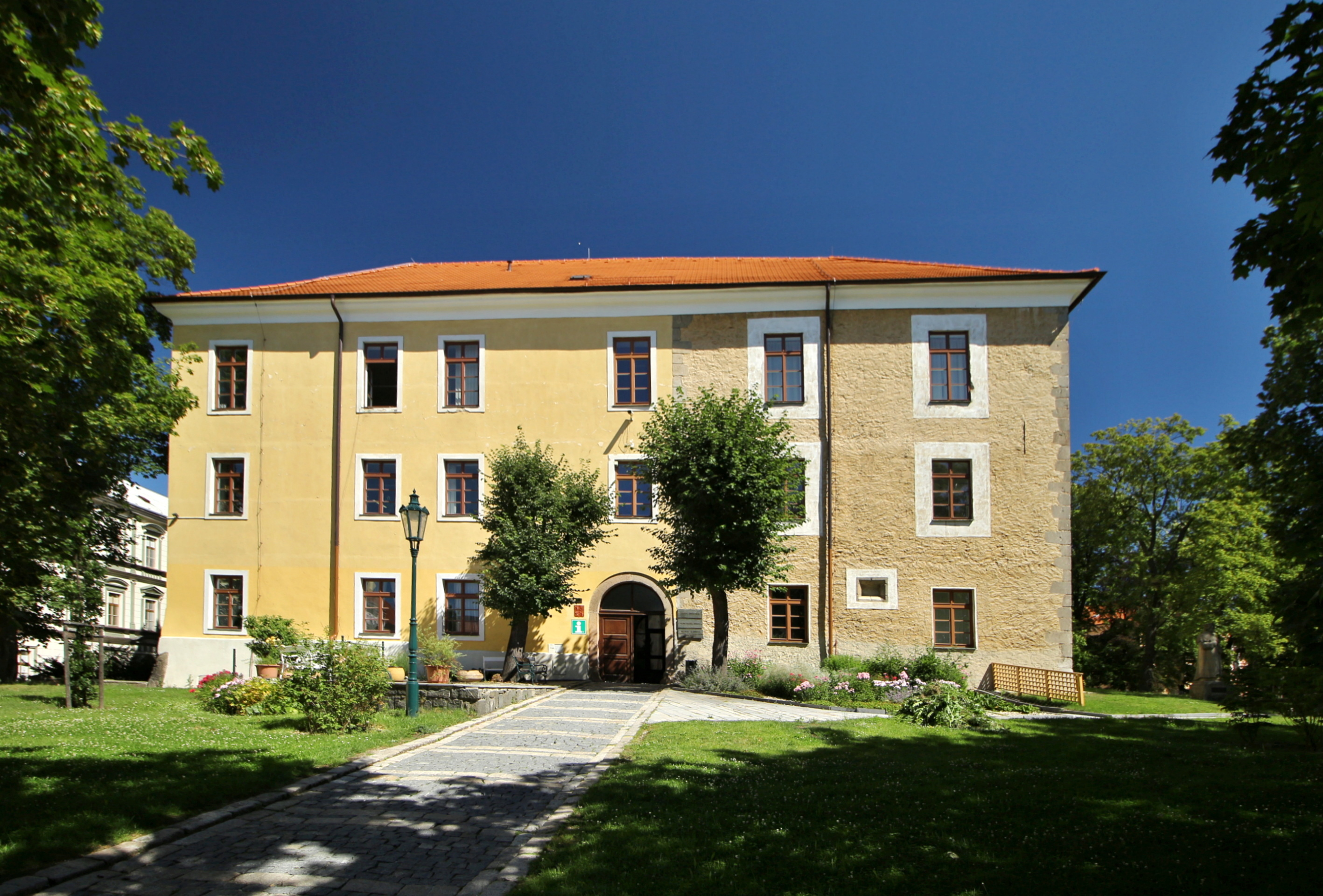 Arcibiskupský zámeček Ernestinum v Příbrami